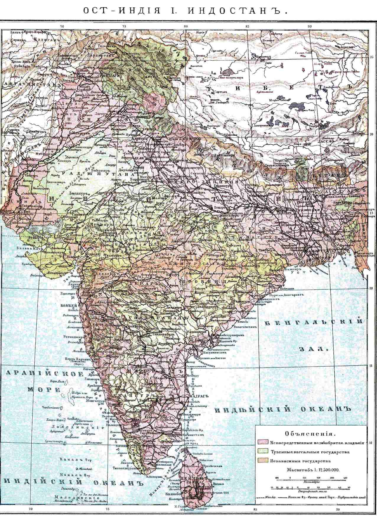 Карта Индии из энциклопедии Брокгауза и Ефрона